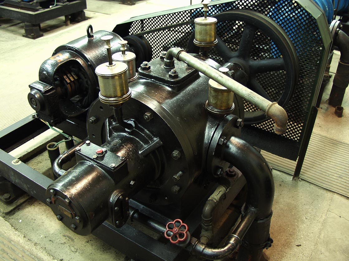 Původní dmychadlo pražské potrubní pošty Hornjoserbsce: Dujadło Praskeho rołoweho pósta